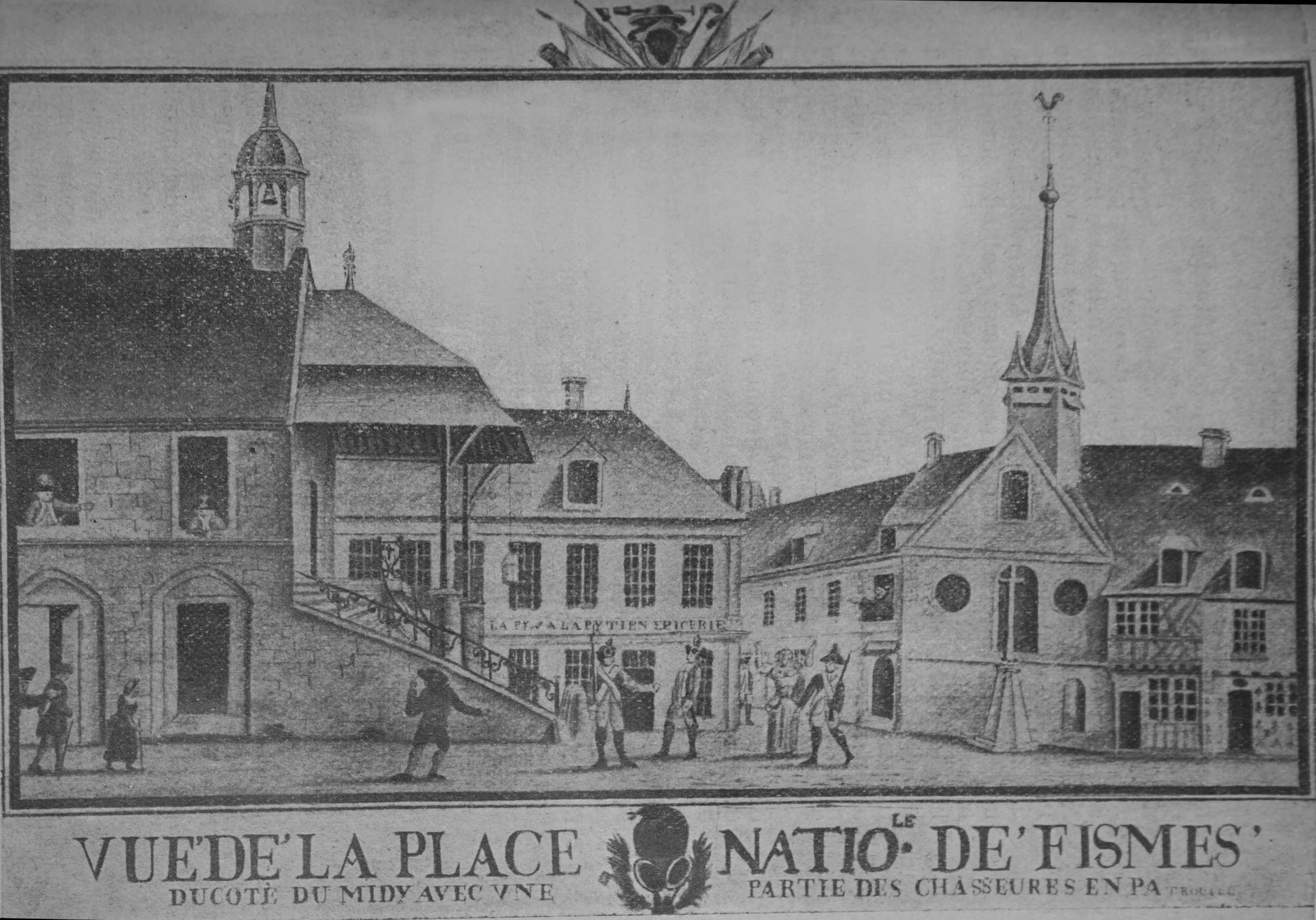 vue de .